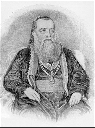 Andrei Şaguna